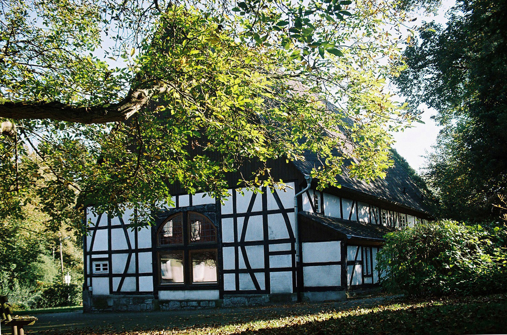 Hagen, altes Bauernhaus Hagen-Emst (Bissingheim), Auf dem Kämpchen 16, AWO-Kulturhof